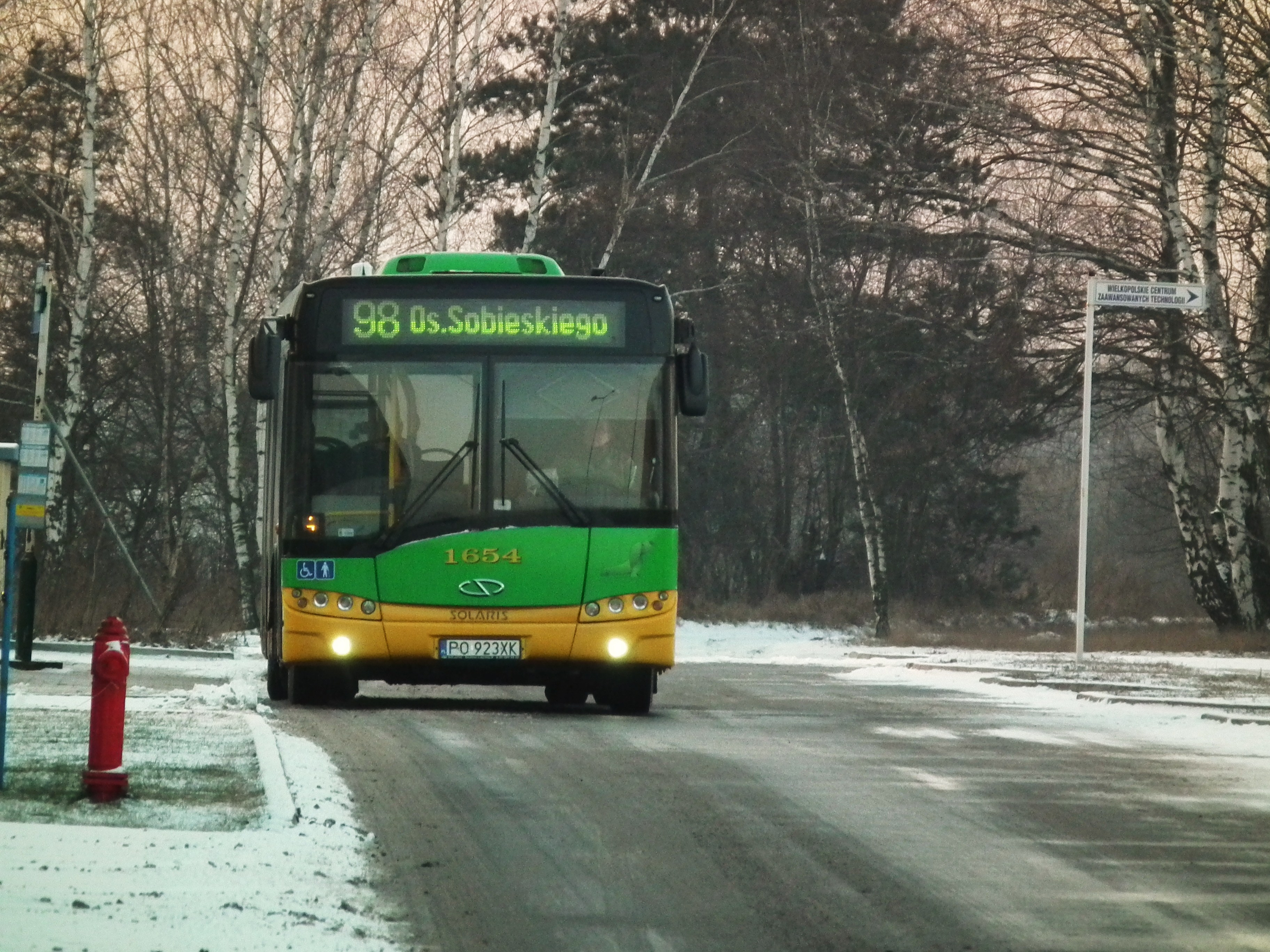 Autobus linii 98 na Kampusie Morasko w Poznaniu (Historicum).